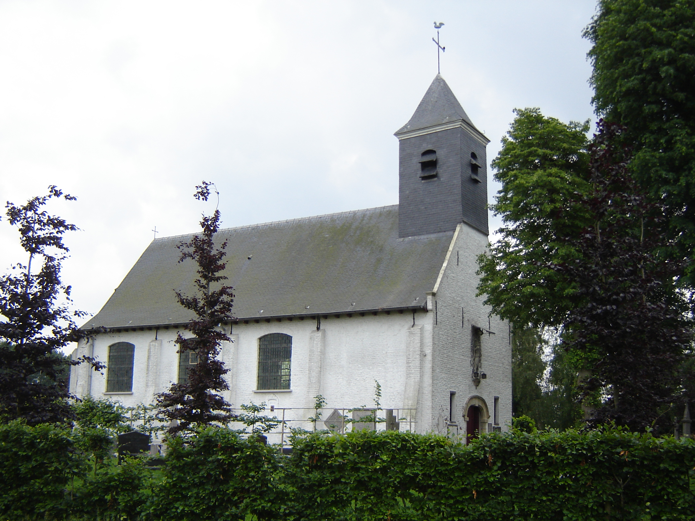 Sint-Jan-Baptistkerk in Sint-Jan-in-Eremo Church of Saint John Baptist in Sint-Jan-in-Eremo, Sint-Laureins, East Flanders, Belgium